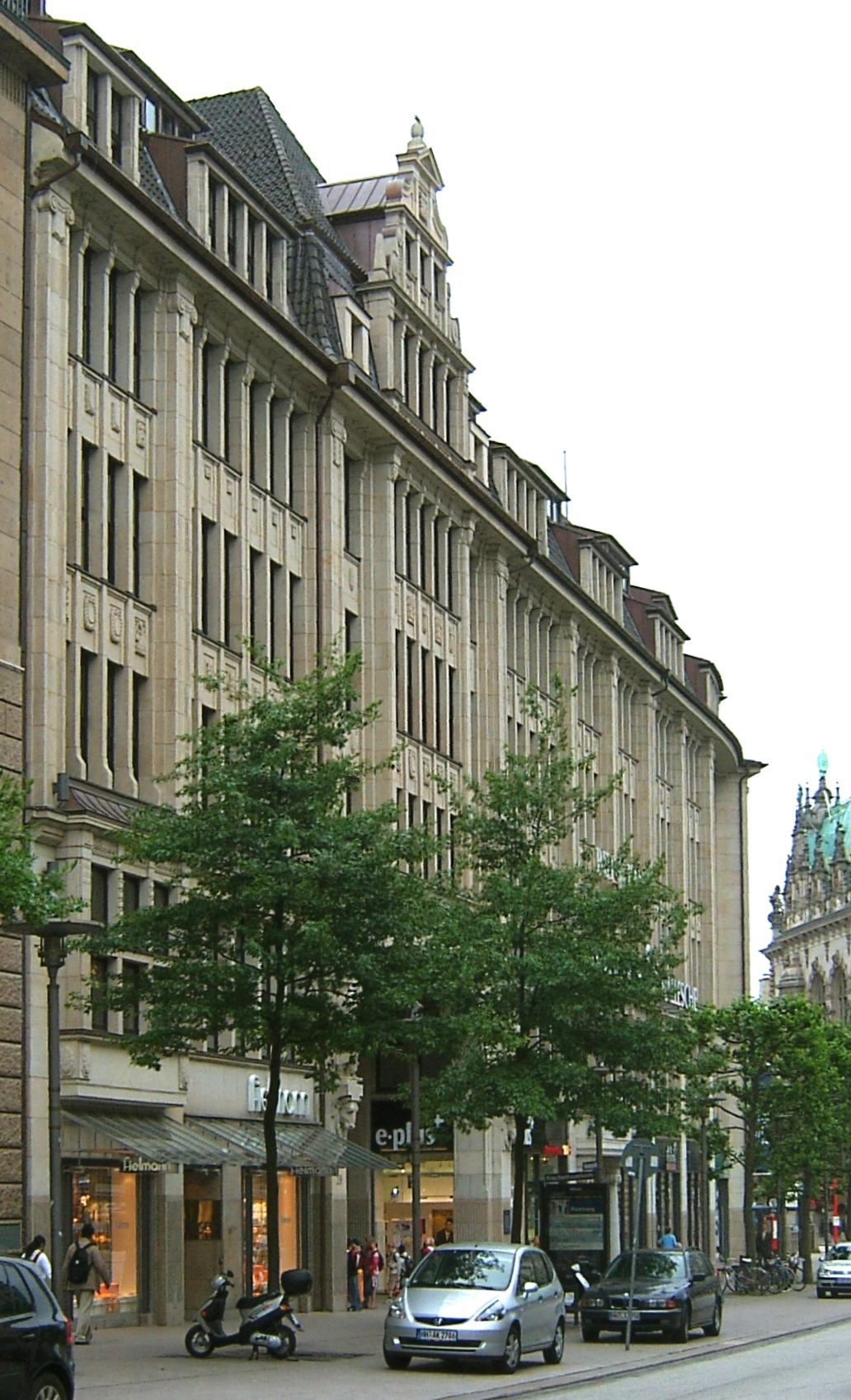 Das Versmannhaus in der Mönckebergstraße 29 - 31 in Hamburg-Altstadt wurde 1910 bis 1912 von Rambatz & Jollasse als Kontorhaus im Renaissancestil erbaut. Es überbaut die Knochenhauertwiete. This is a photograph of an architectural monument.